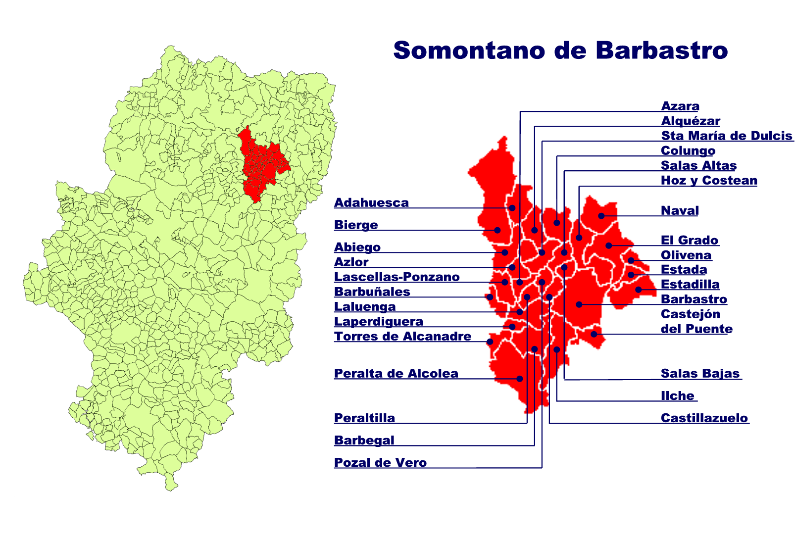 Comarca del Somontano de Barbastro